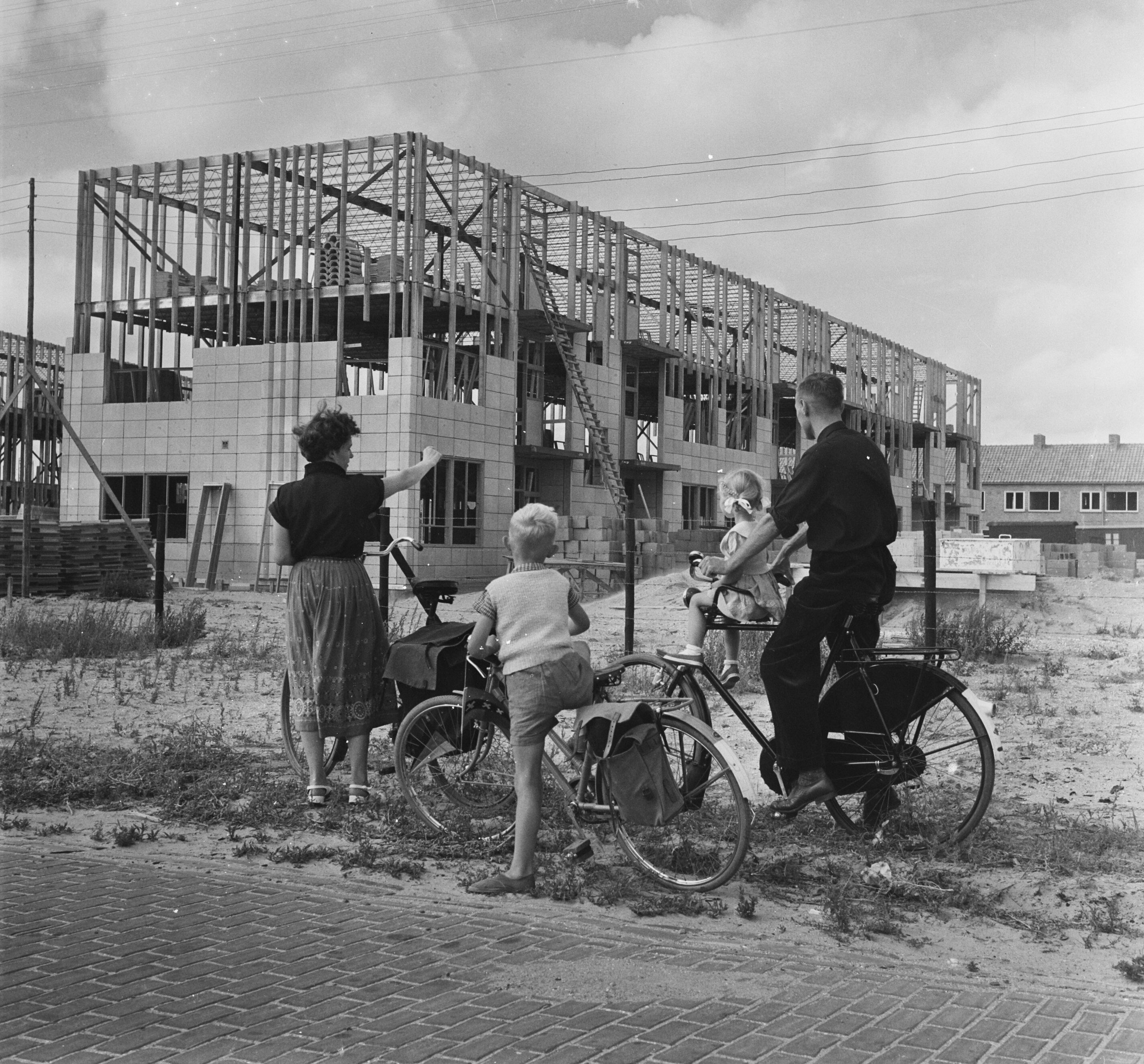 Collectie / Archief : Fotocollectie Anefo Reportage / Serie : [ onbekend ] Beschrijving : Uitbreiding woningbouw Slotermeer West Datum : 11 augustus 1952 Locatie : Amsterdam, Noord-Holland, Slotermeer Trefwoorden : Uitbreidingen, WONINGBOUW Fotograaf : Noske, J.D. / Anefo Auteursrechthebbende : Nationaal Archief Materiaalsoort : Negatief (zwart/wit) Nummer archiefinventaris : bekijk toegang 2.24.01.03 Bestanddeelnummer : 905-2614